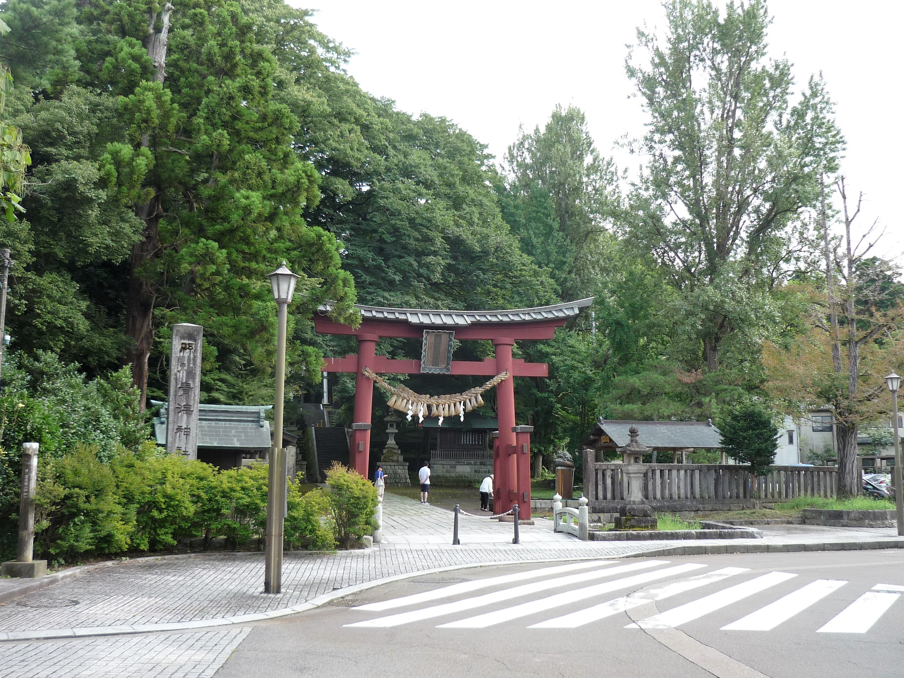 青海神社（新潟県加茂市大字加茂229）鳥居